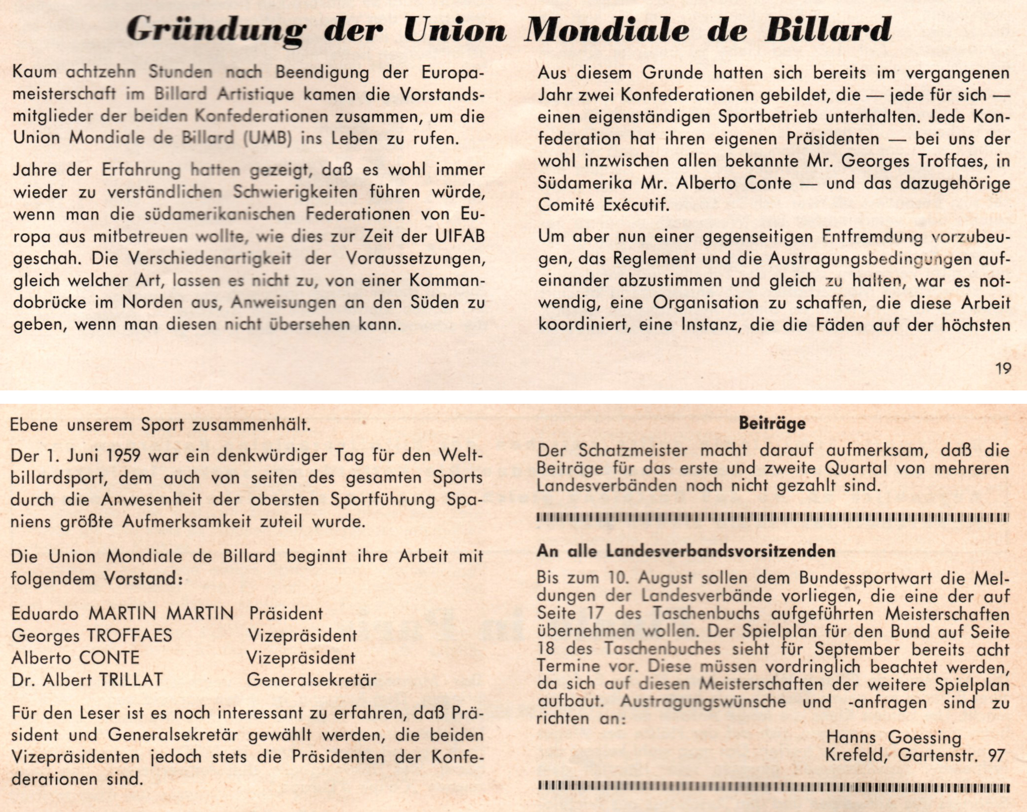 see file name